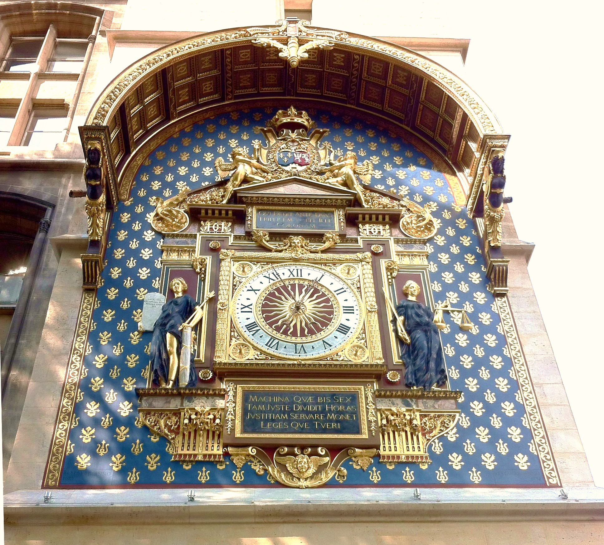 L'horloge du palais de la Cité après sa rénovation le 10 septembre 2012. .